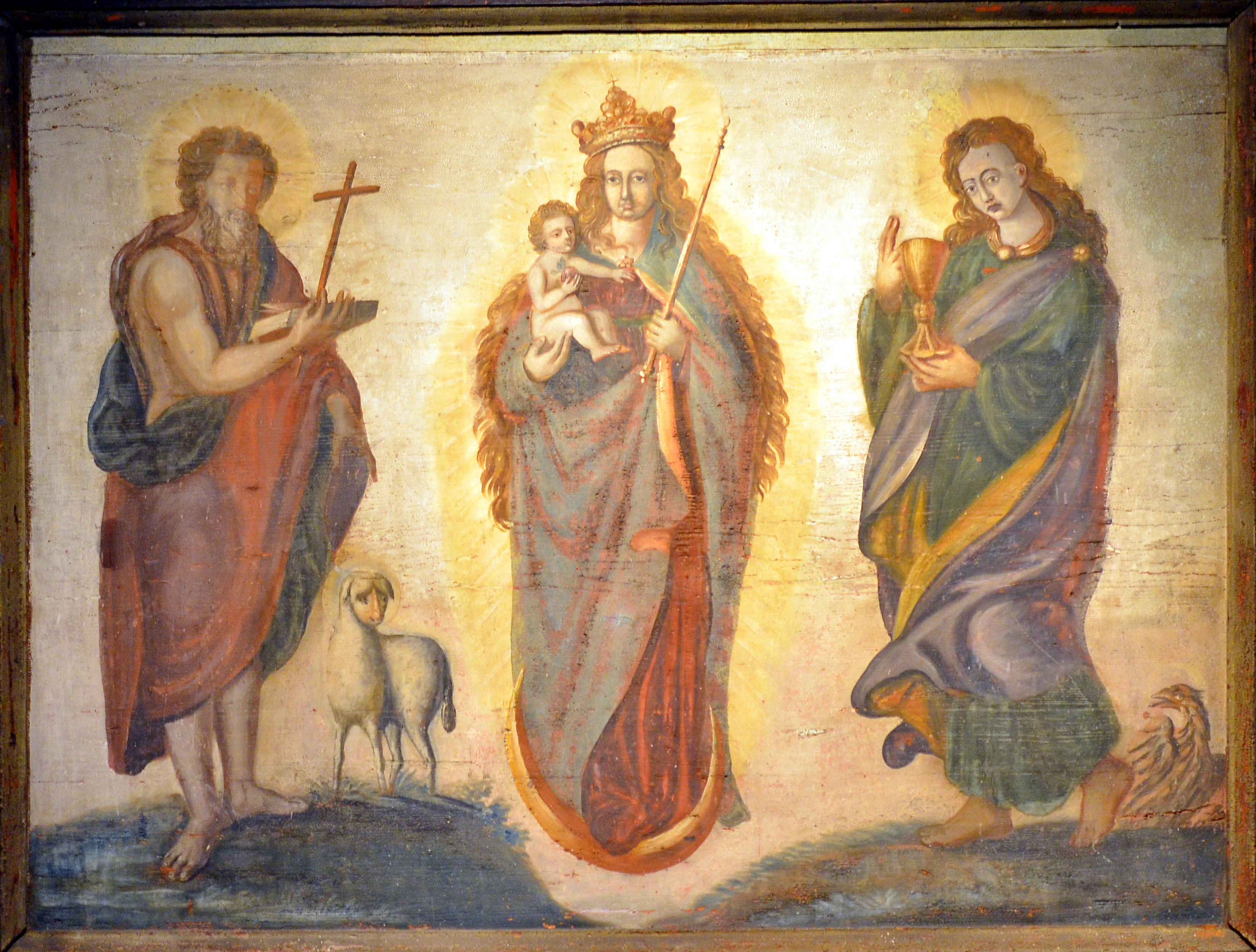 Das 2010/2012 runderneuerte Stadtmuseum in Rapperswil (SG) und seine Sammlung:Altarbild aus dem Heilig-Hüsli, Das Tafelbild des einstigen Renaissance-Alters zeigt in der Mitte schweben die gekrönte Muttergottes mit Kind und Szepter, auf der Mondsicherl stehend, flankiert von den beiden Rapperswiler Stadtpatronenen: Hl. Johannes der Täufer mit Kreuz, Buch und Lamm sowie der Evangelist mit Kelch und Adler zu seinen Füssen.